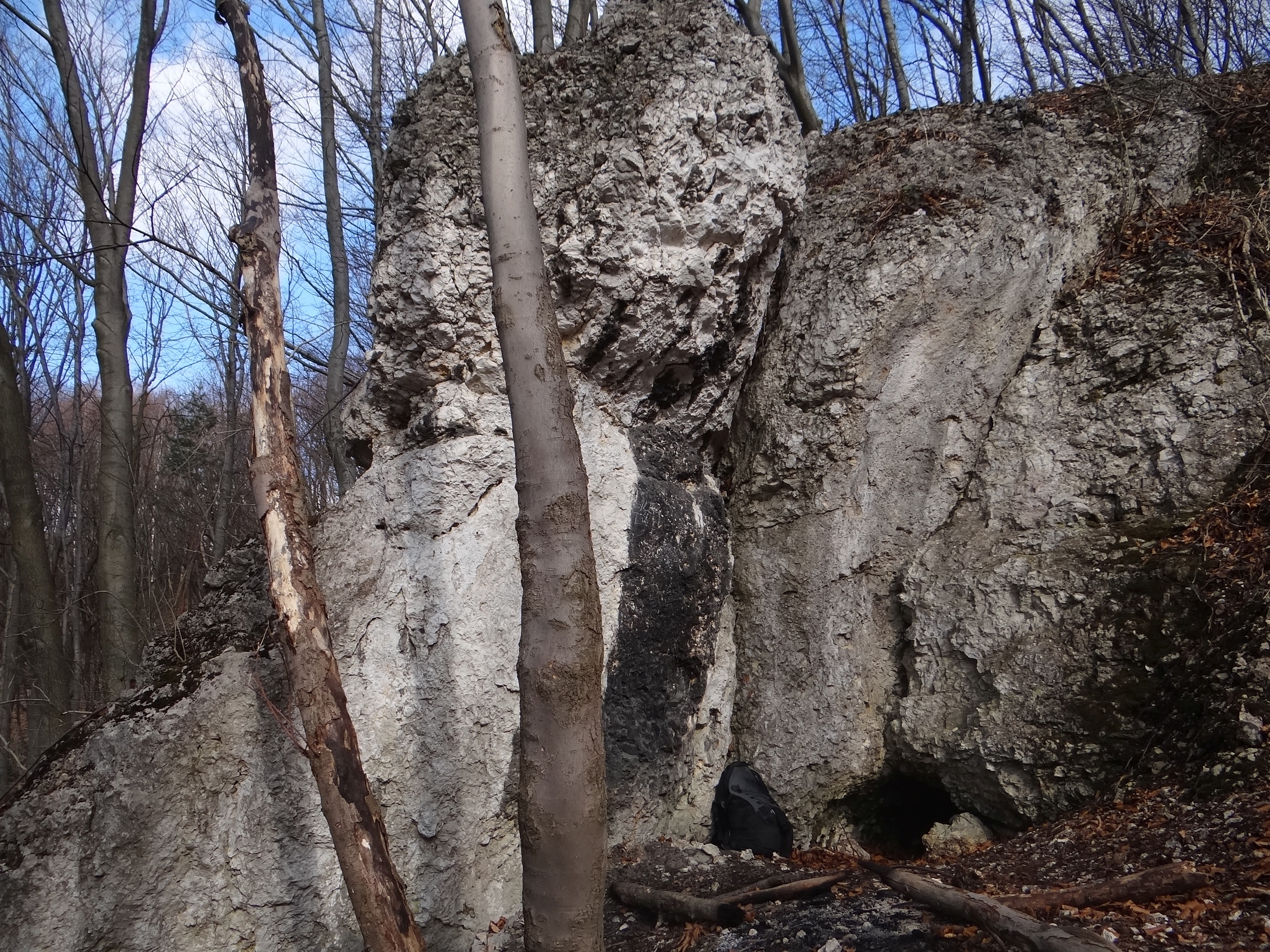 Schronisko powyżej Jaskini nad Szańcem